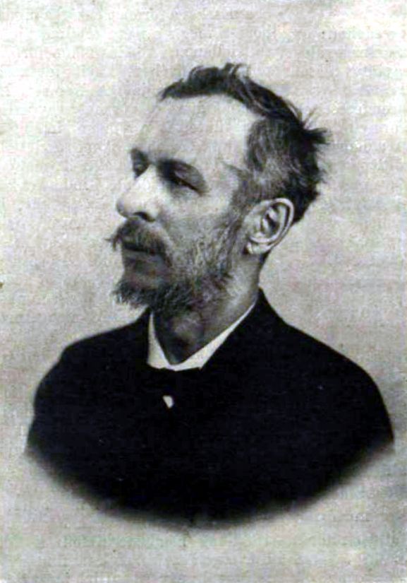 Portrait of Gusztáv Kelety